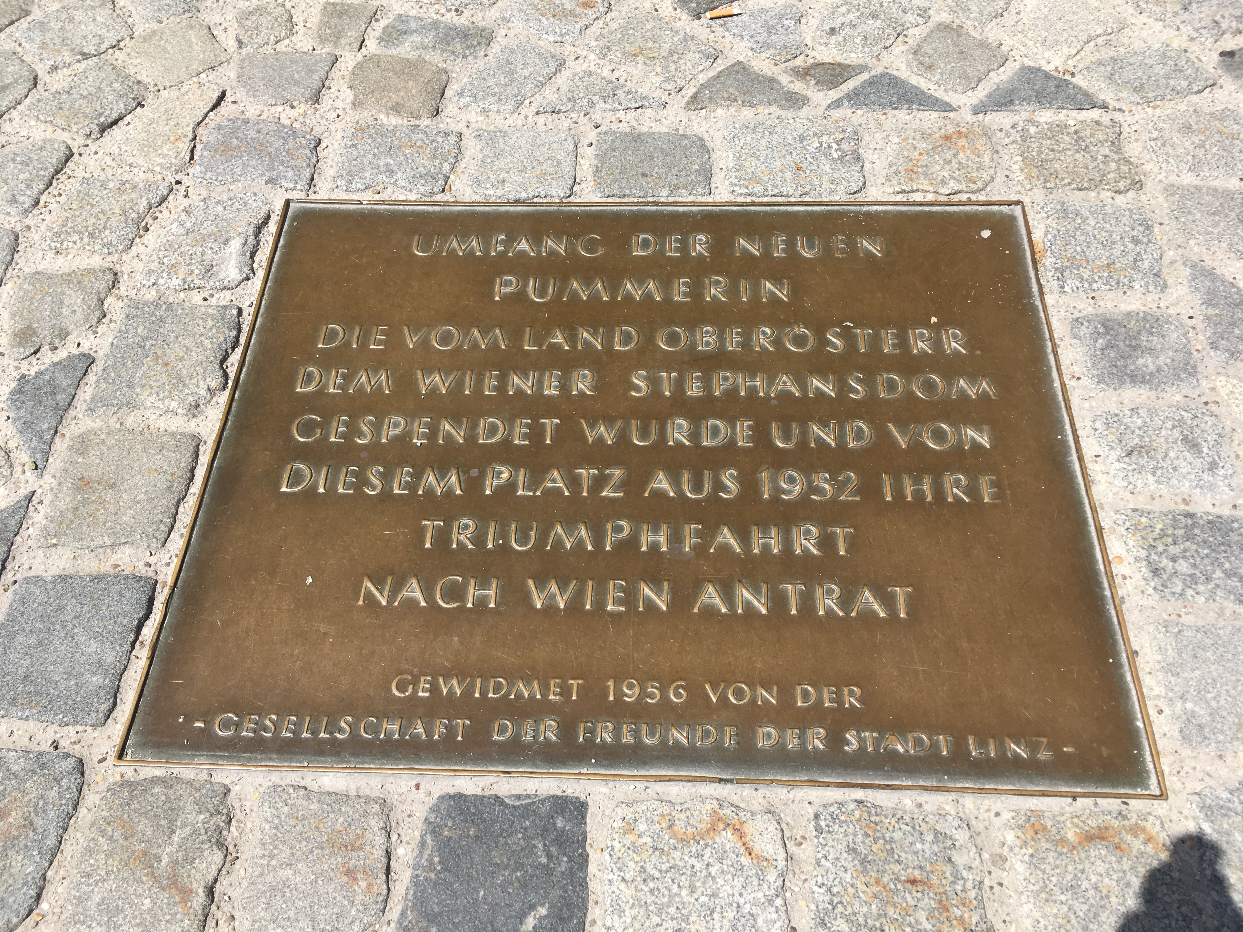 Inschrift innerhalb des Glockenrings der Pummerin vor dem Linzer Landhaus